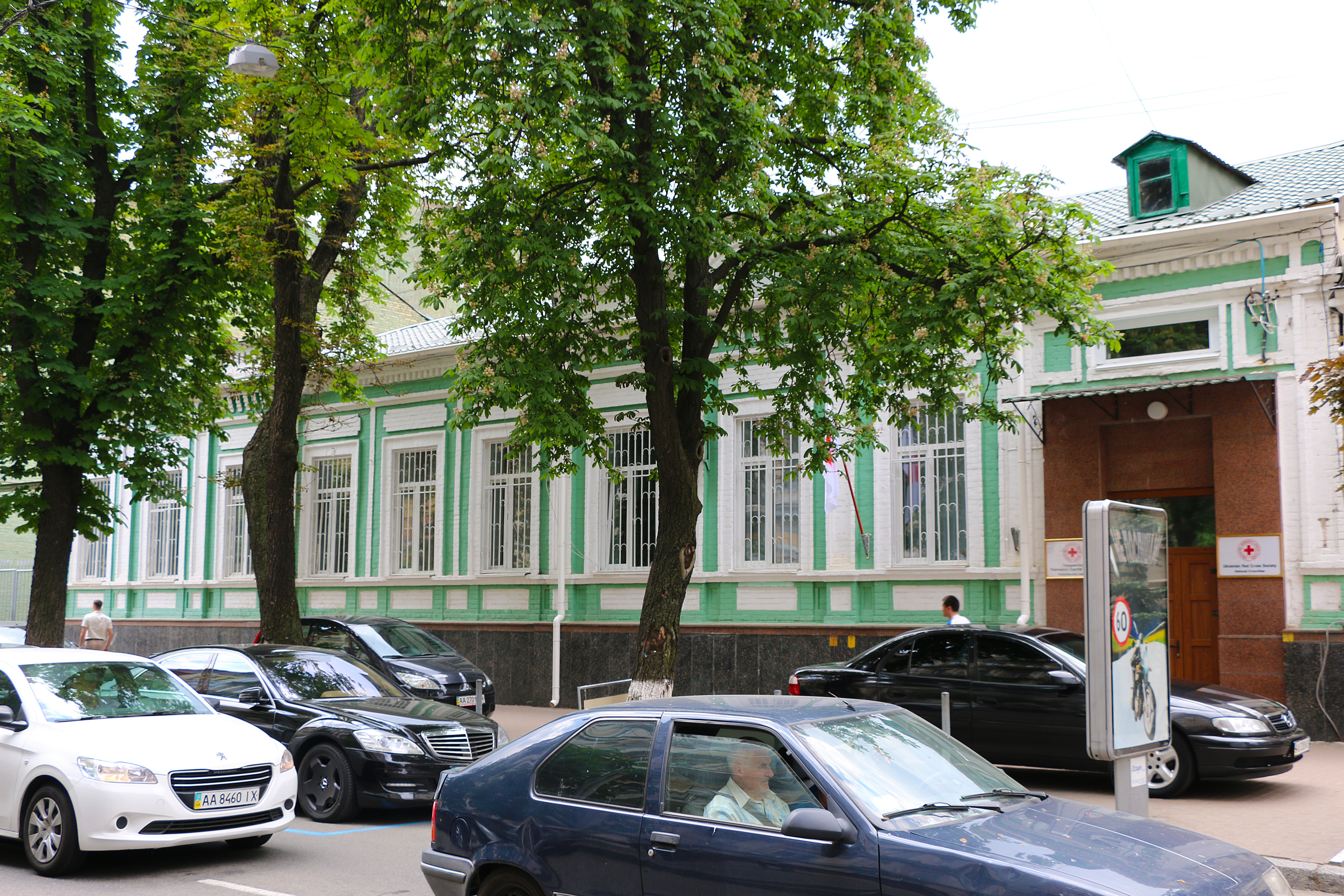 Флігель, Київ, Пушкінська вул., 30-б